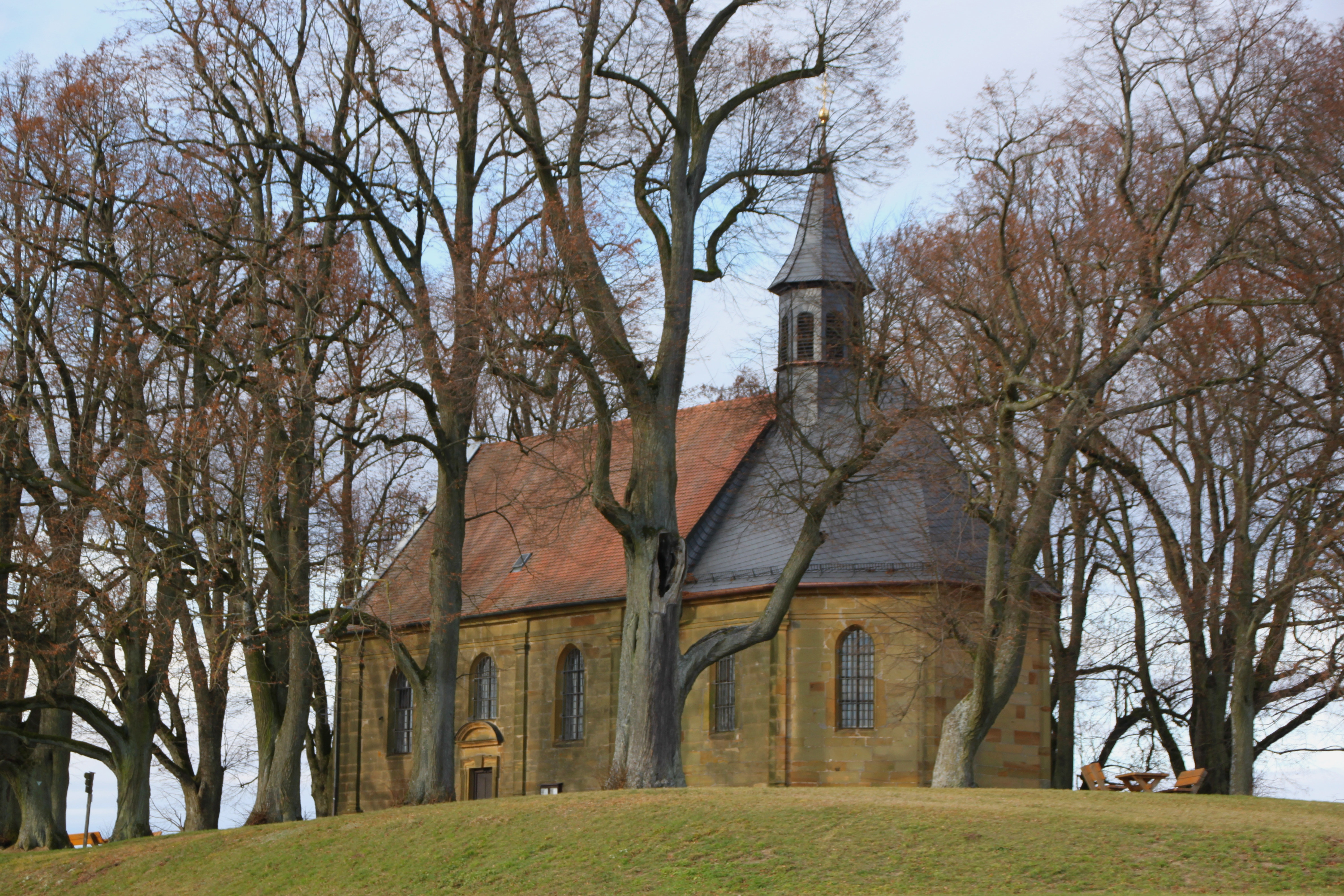 Katholische Filial- und Wallfahrtskirche Sankt Veit mit Lindenkranz, Nähe Dittersbrunn, Veitsberg, auf dem Ansberg, Baudenkmal D-4-78-120-49